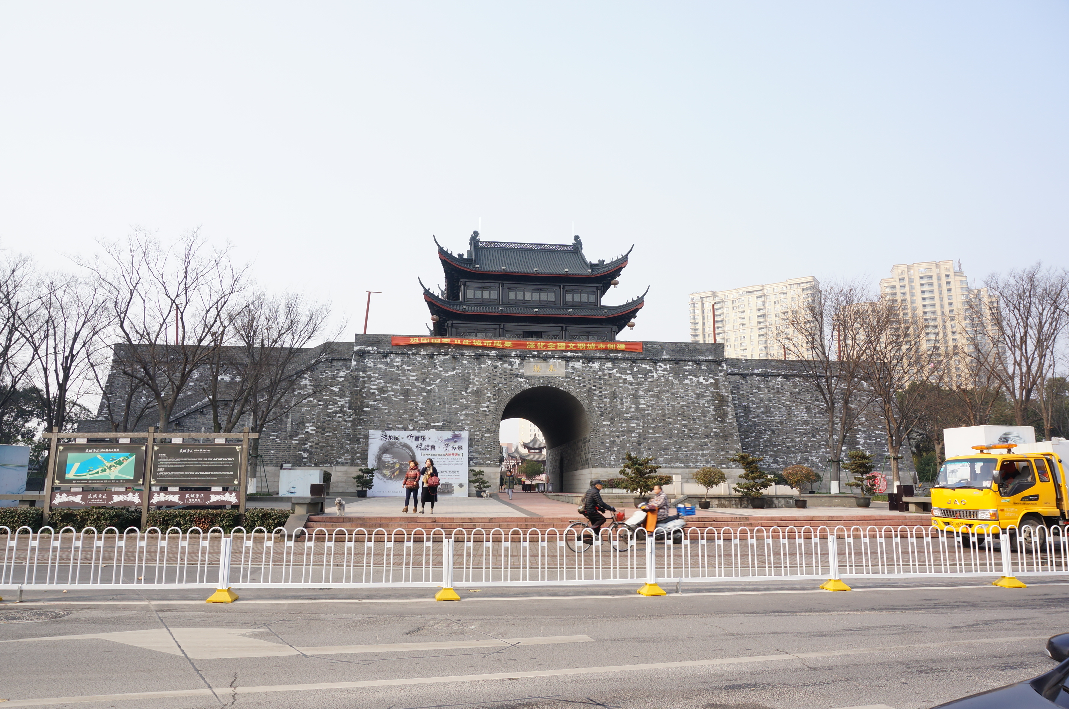 湖州奉胜门（重建），南侧（内侧）。